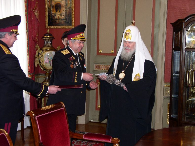 Вручение патриарху Алексию ІІ Хрустальной булавы и ордена УРК "Серебряный казацкий Крест ІІ степени"